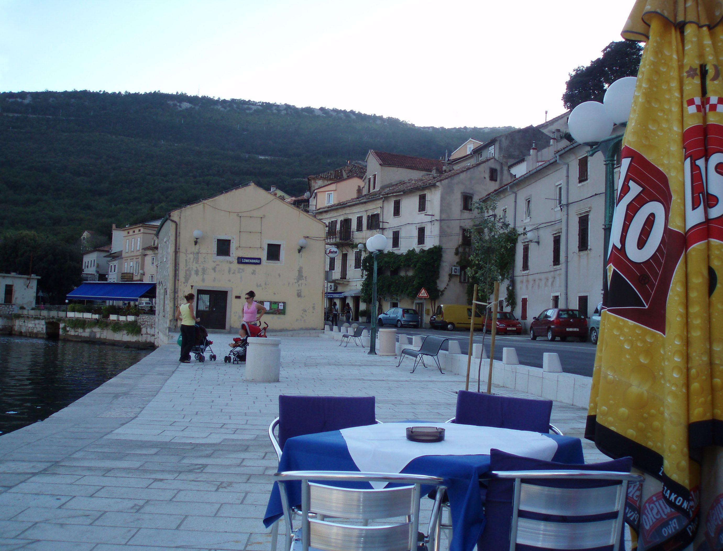 Bakar